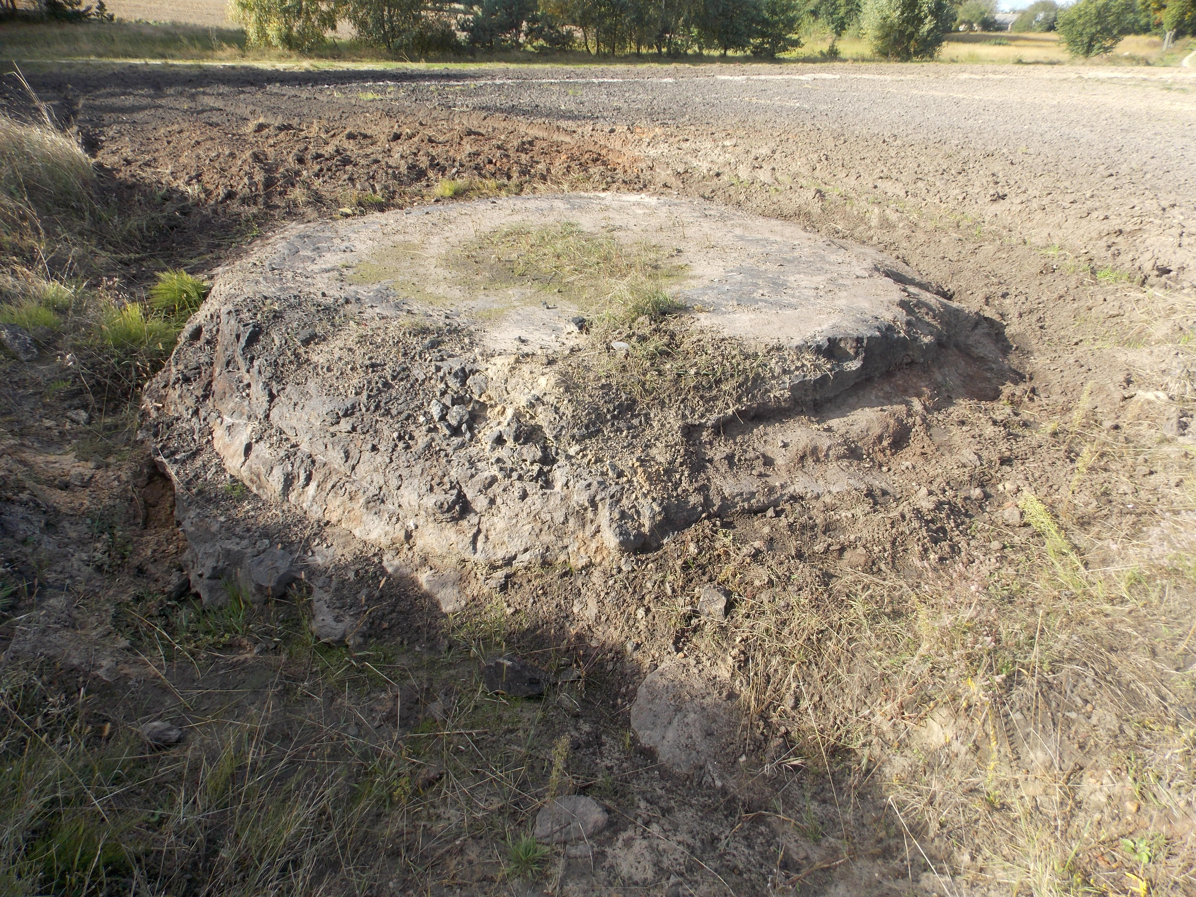 Smolny piec w Sycynie gm. Biała Podlaska, XVII w.